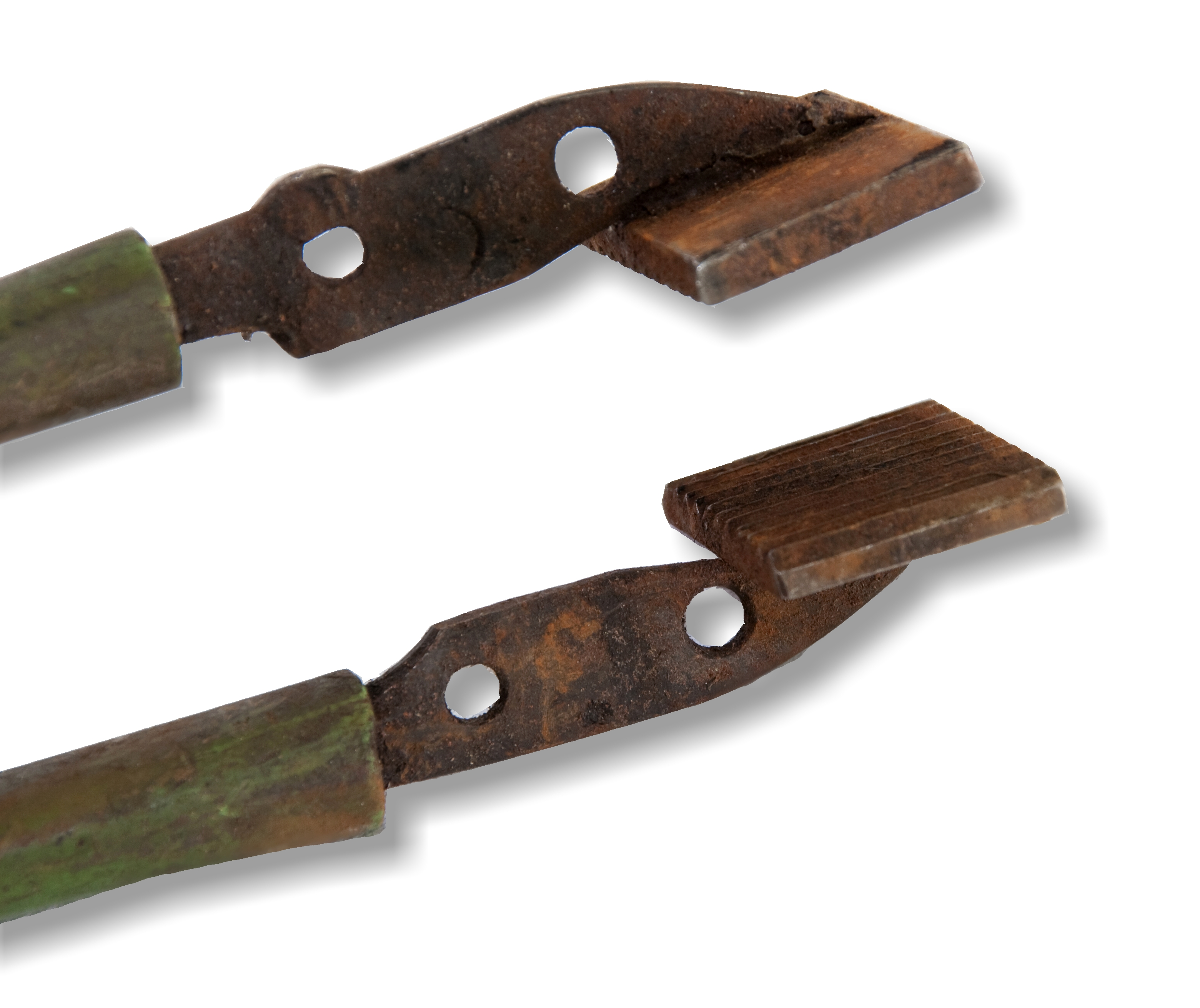 Česky: Detail cvokajzu (kapráku). Cvokajz se používá na dekorování skla (např. formování různých lupínků). Drážky na dvou protilehlých ploškách jednak brání sklouznutí a za druhé se na sklo obtiskují. Jedná se v podstatě o plochou pinzetu. Sklárna Nenačovice, okres Beroun. This picture was taken and/or got within the scope of the 'Acquiring scientific and specialized pictures' grant.